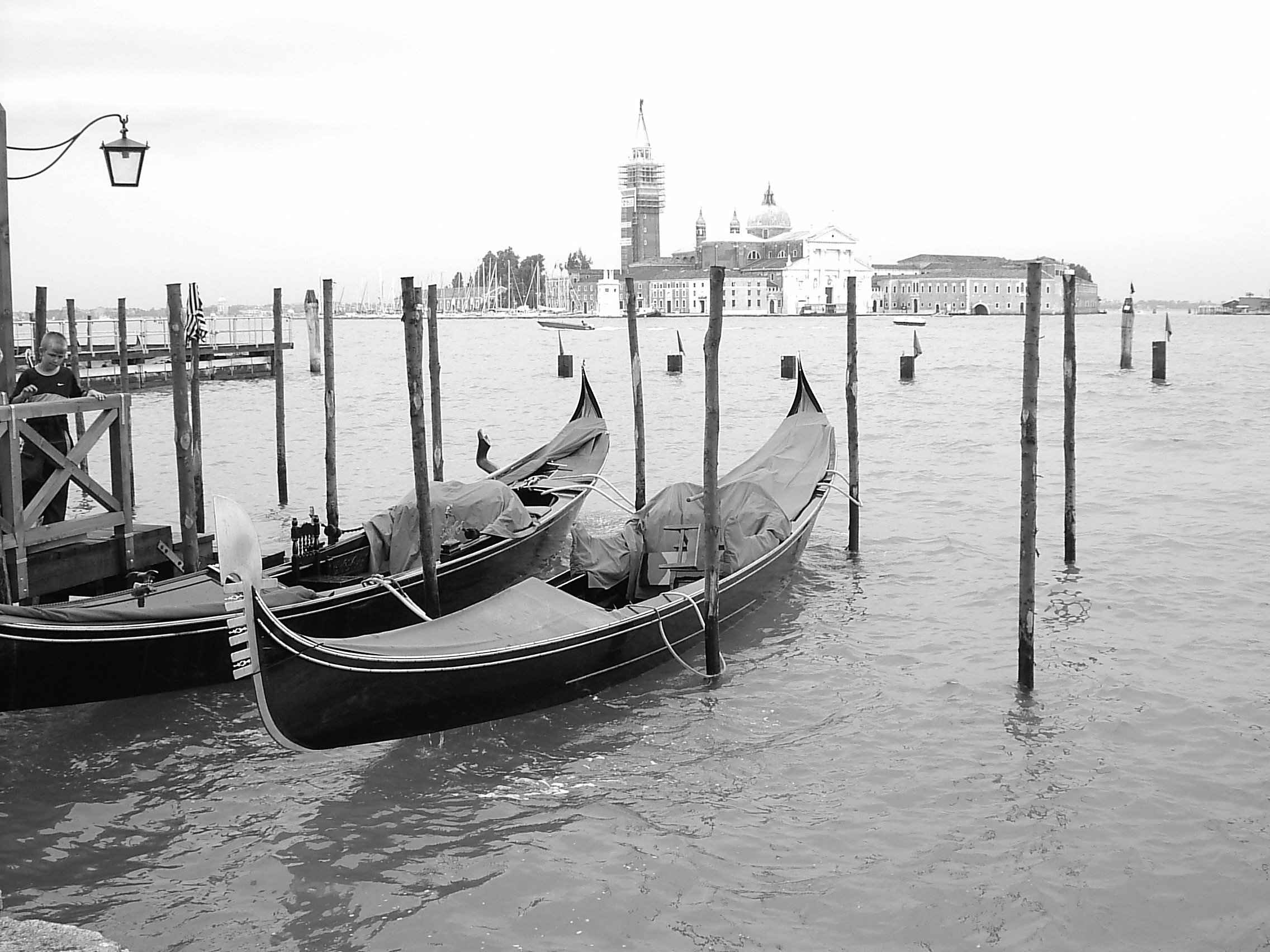 Gondeln an der Anlegestelle der Piazzetta, Venedig